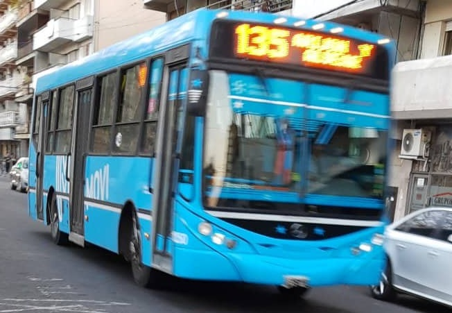 Mercedes-Benz afectado a la línea 135, cuya prestataria es la empresa municipal Movi